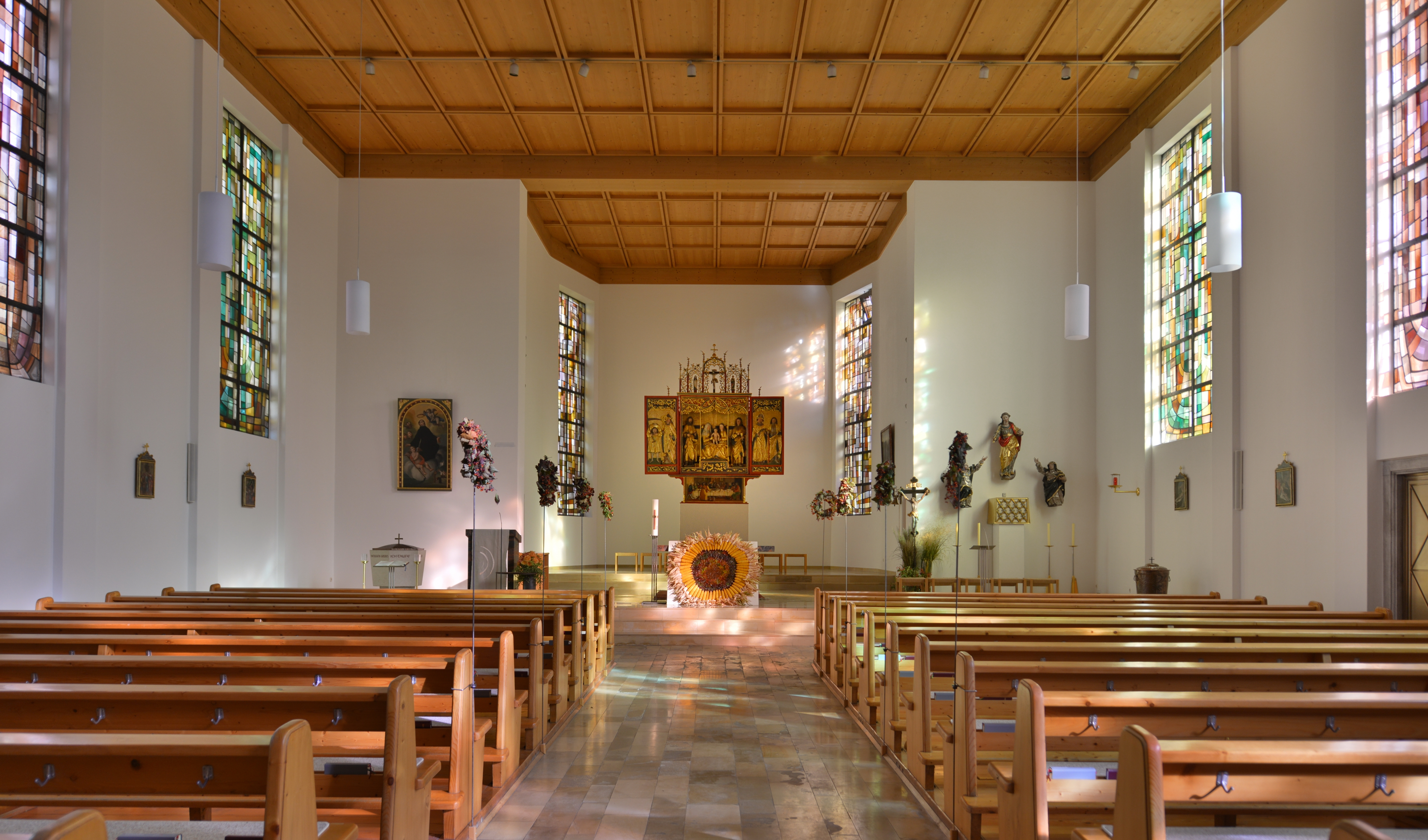 Expositurkirche hl. Eusebis, in Brederis (Rankweil). Erbaut nach Plan von Jakob Marte im Jahr 1958.